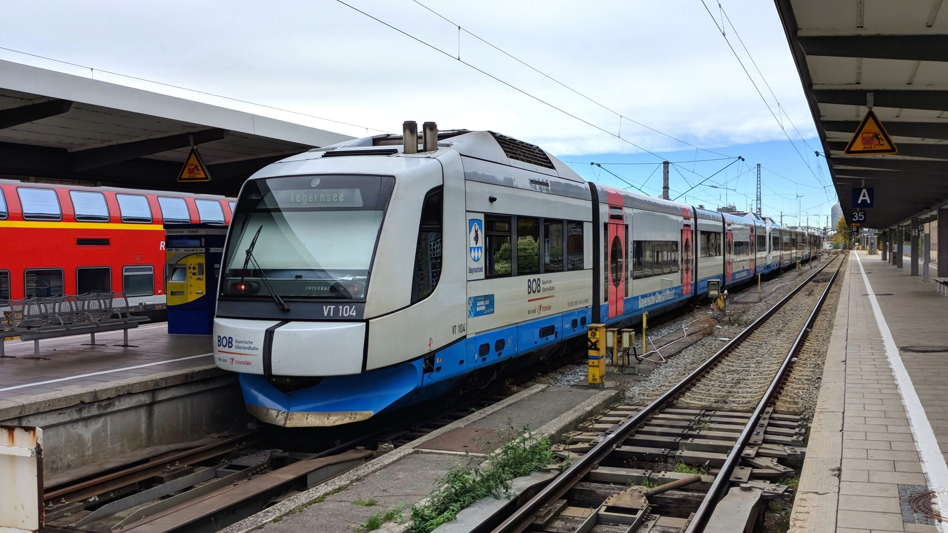 VT 104 der Bayerischen Oberlandbahn, ein Integral S5D95 mit Taufnamen "Bayrischzell", auf Gleis 34 am Münchner Hauptbahnhof kurz vor seiner Abfahrt in Richtung Tegernsee.